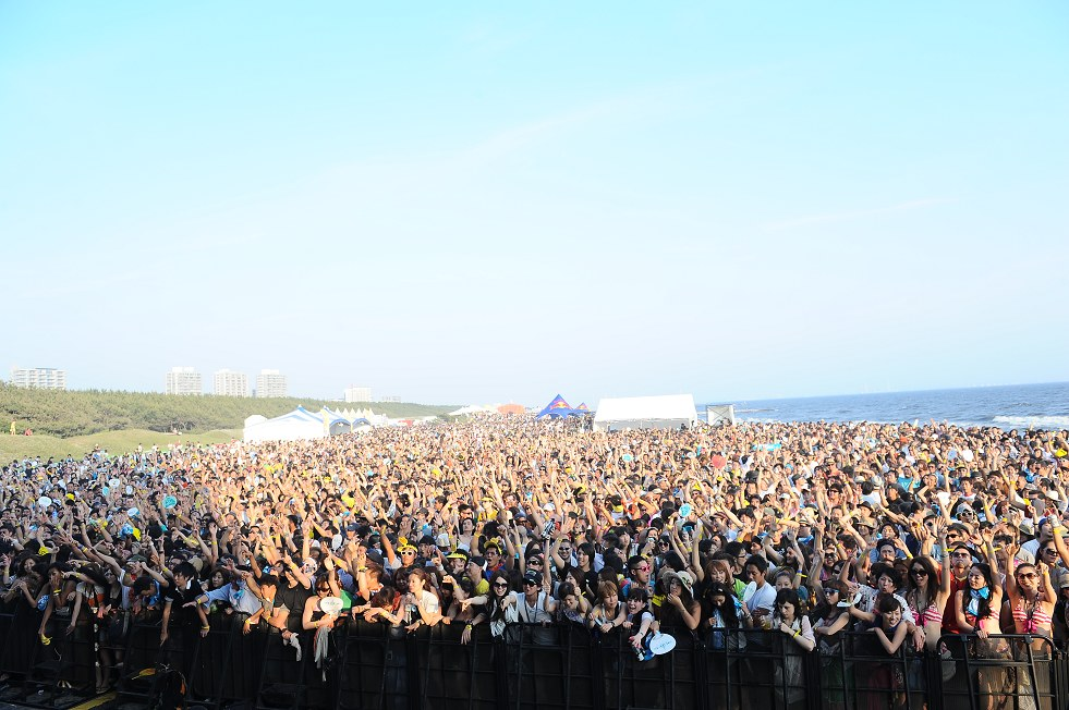 ビッグビーチフェスティバル’１１